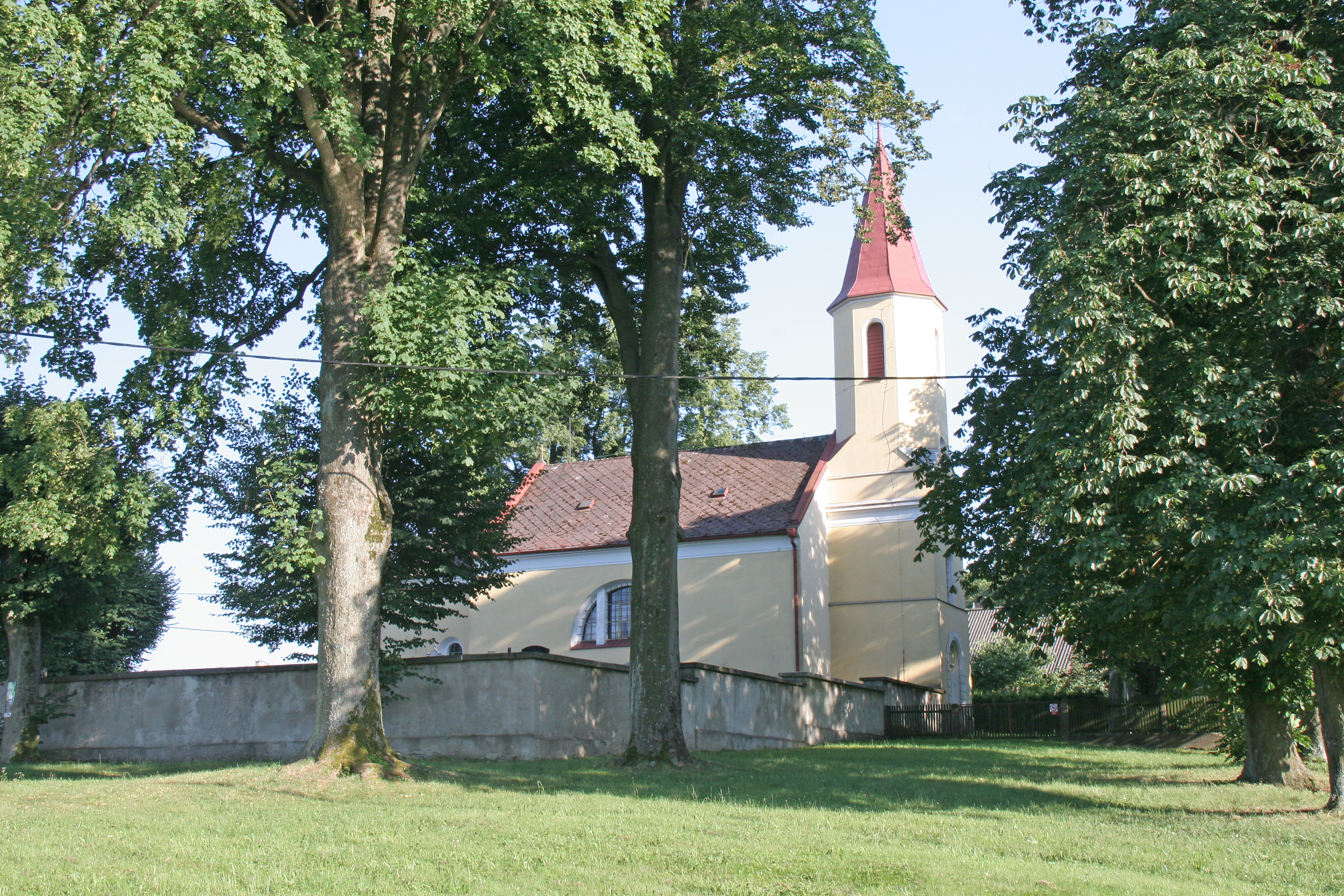 Kostel svatého Václava, Hrbokov.